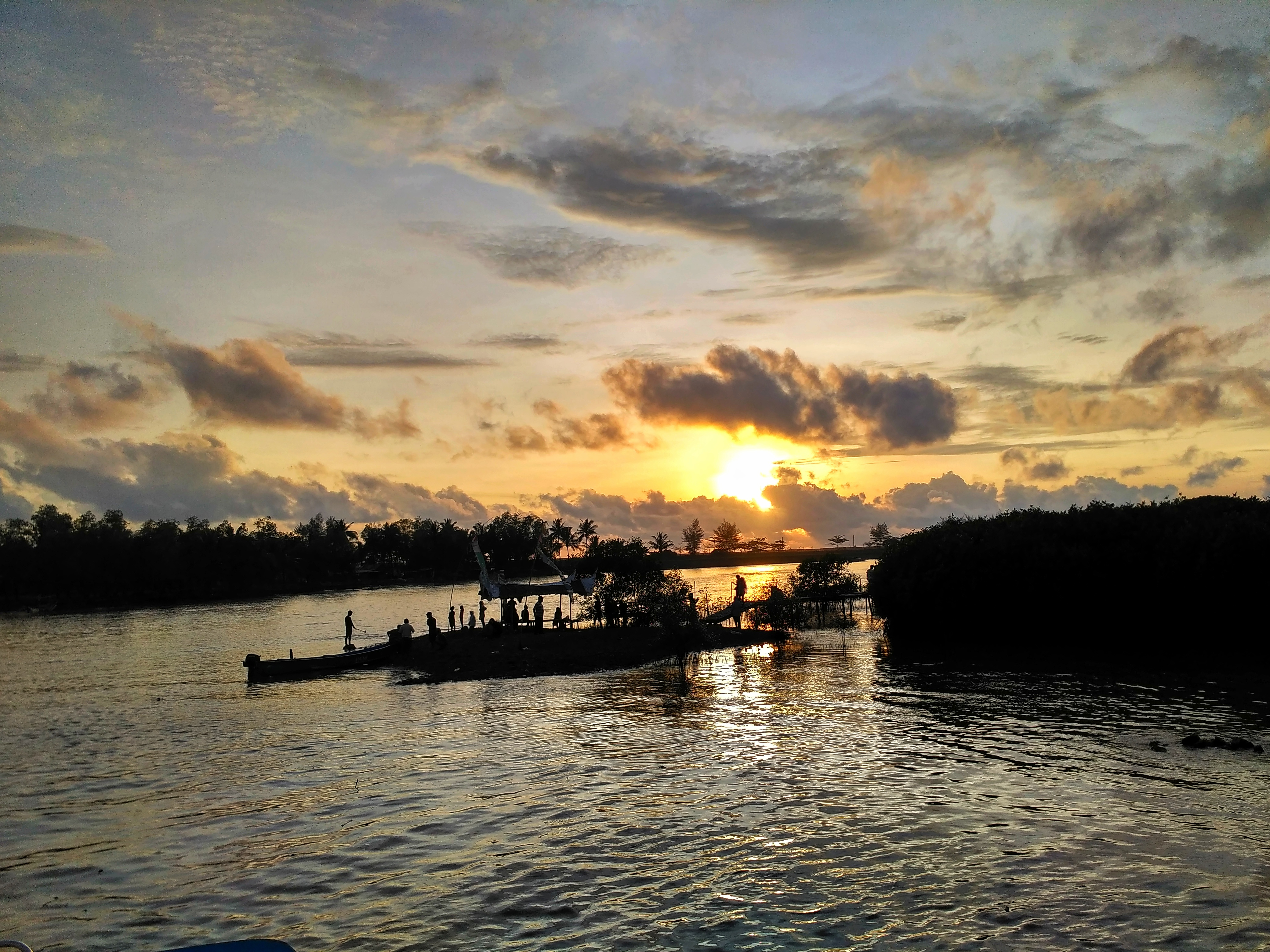 Keindahan sisi pantai logending yg terletak di kota Jawa tengah kabupaten kebumen tepatnya kecamatan ayah